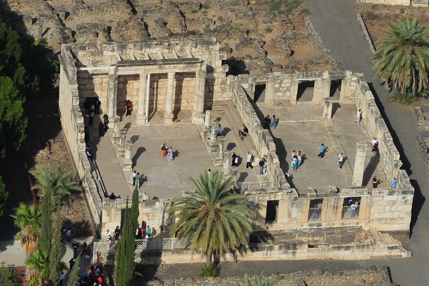 כפר נחום היה יישוב בחופה הצפוני של הכנרת, לא הרחק מכורזים, בבקעת עין שבע. כיום האתר הוא גן לאומי המשתרע על-פני שטח של 80 דונם.